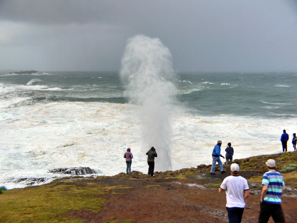 Le geyser de Kiama en Nouvell Galles du Sud en Australie